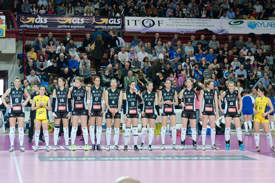 Stagione 2014-15